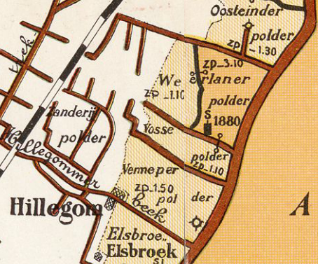 Vosse- en Weerlanerpolder